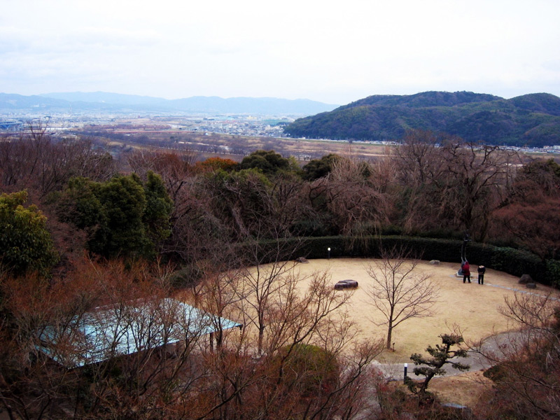 アサヒビール大山崎山荘美術館 山荘テラスから三川合流を望む taken bu myself Category:大山崎町の画像